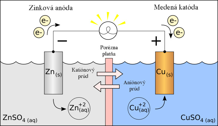 Galvanický článok